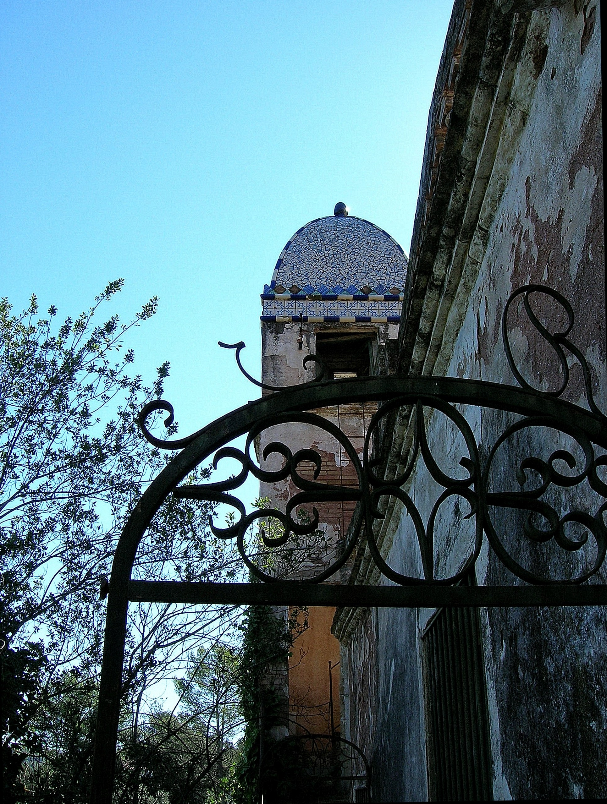 Can Pitarra (Cervelló)